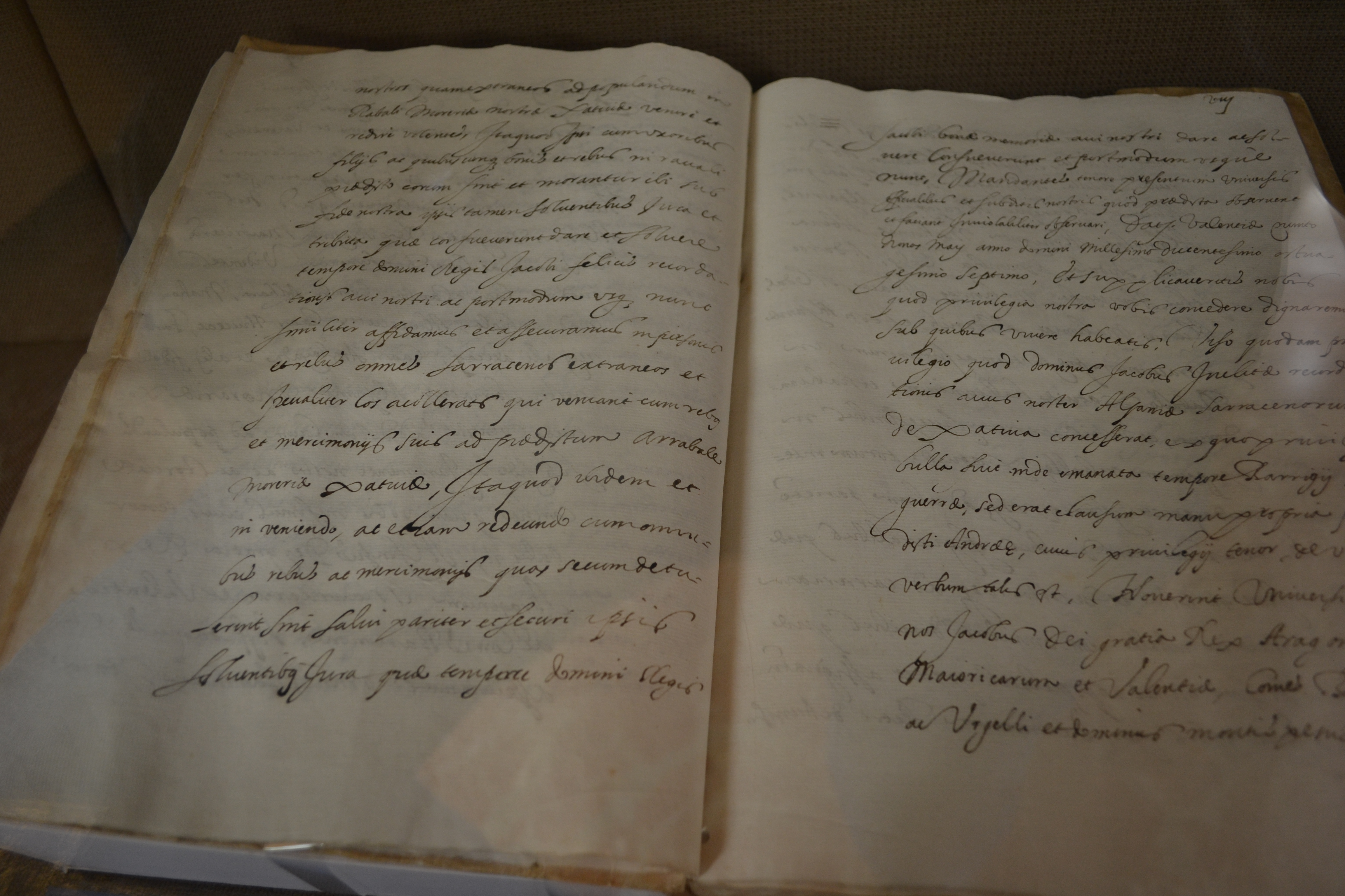 Jaume I atorga carta pobla als musulmans qui hi van a viure a la moreria de la ciutat de Xàtiva (12 de gener de1252). ARV: Reial Cancelleria, núm. 1533, fol. 8r (còpia de 8 de febrer de 1604). Arxiu del Regne de València.